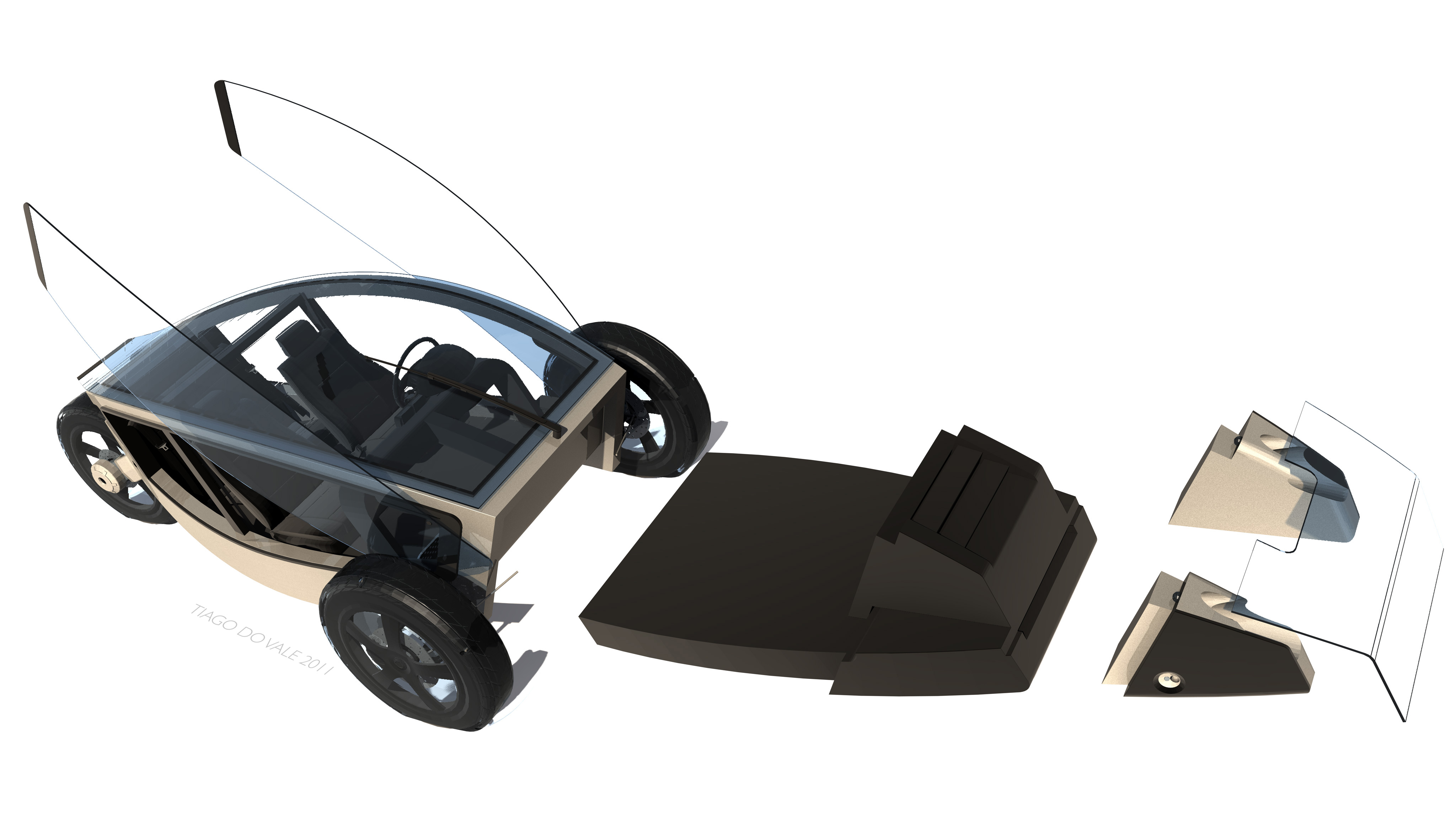 OScar - Open Source Car - design proposal, made by Tiago do Vale.